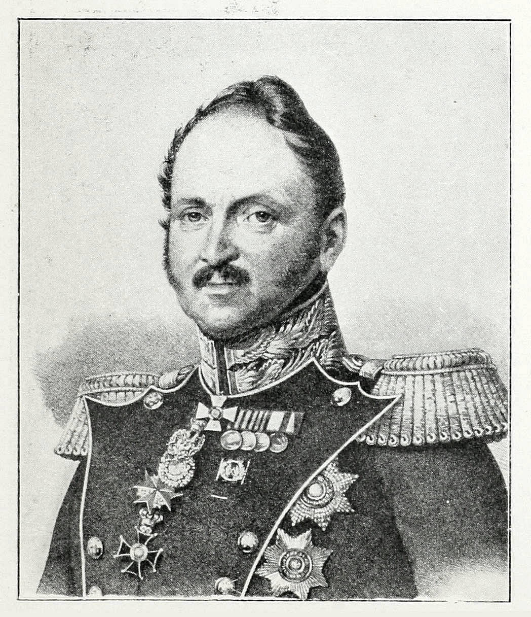 Это изо было использовано в статье «Головин, Евгений Александрович» опубликованной в восьмом томе «Военной энциклопедии», который был издан книгоиздательским товариществом И. Д. Сытина в 1912 году в столице Российской империи городе Санкт-Петербурге.